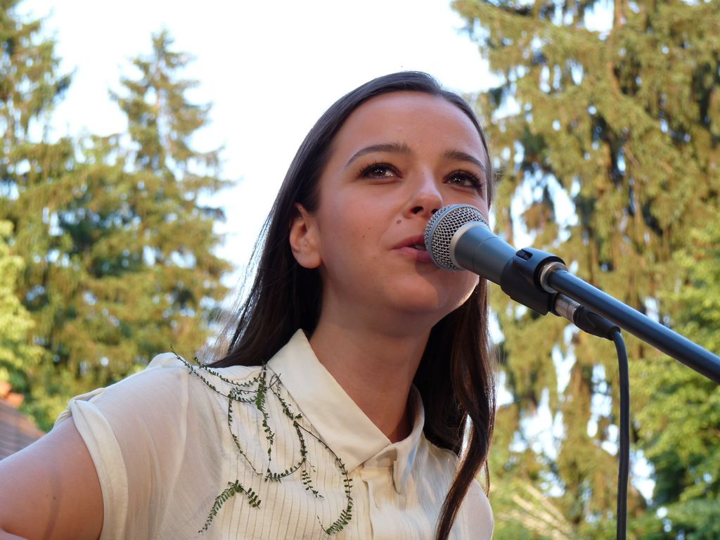 Severa Gjurin